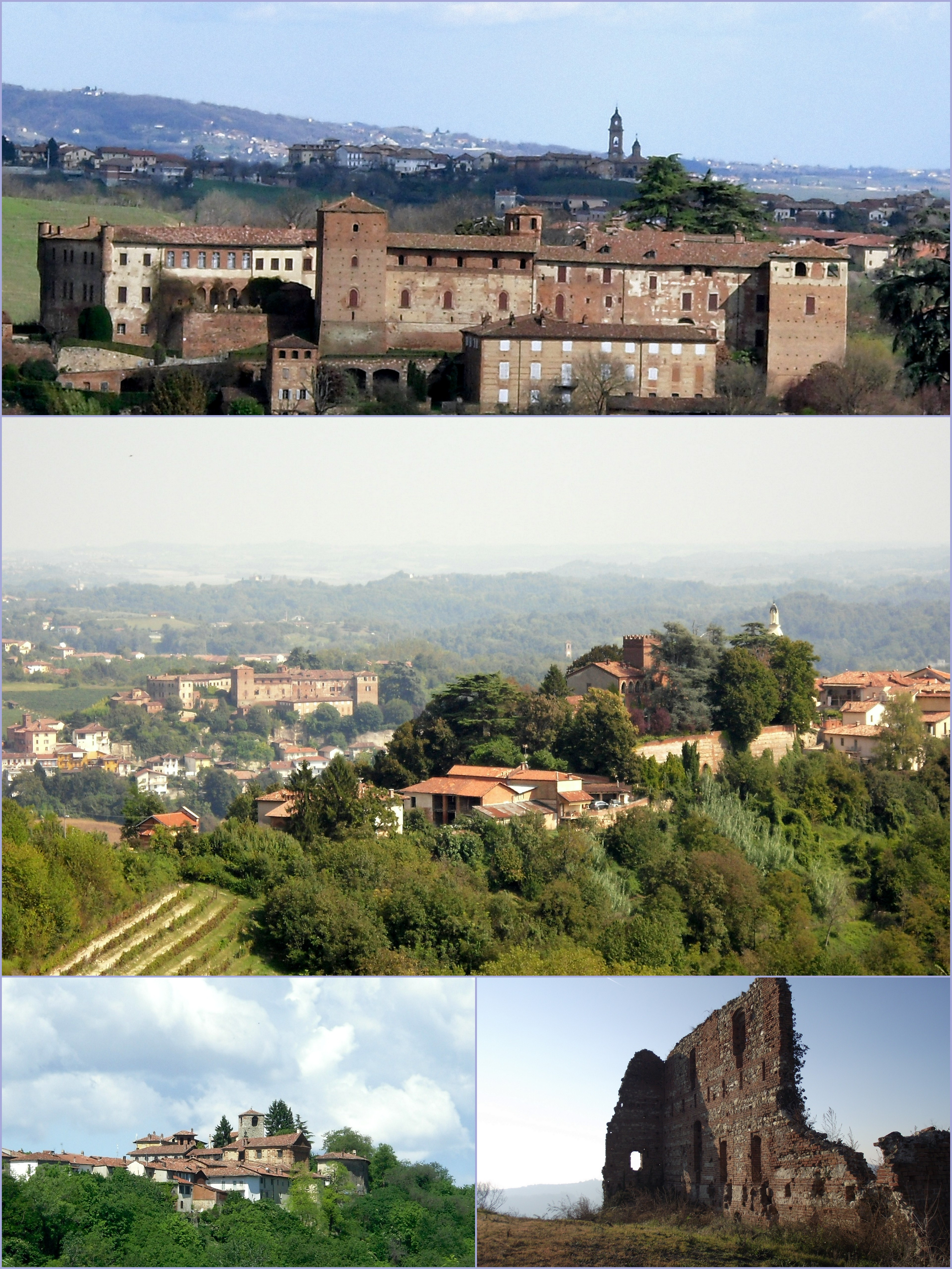 Dall'alto in basso: castello di Passerano Marmorito, castello e borgo di Primeglio (sullo sfondo castello e borgo di Passerano Marmorito), borgo di Schierano, ruderi del castello di Marmorito